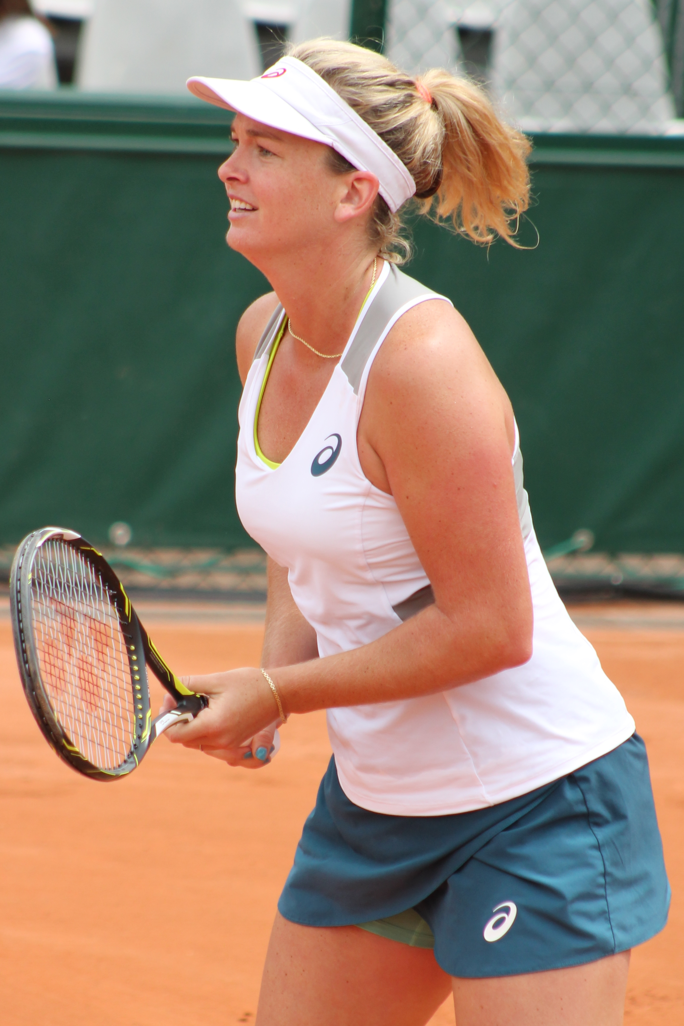 Vandeweghe RG16 (3)